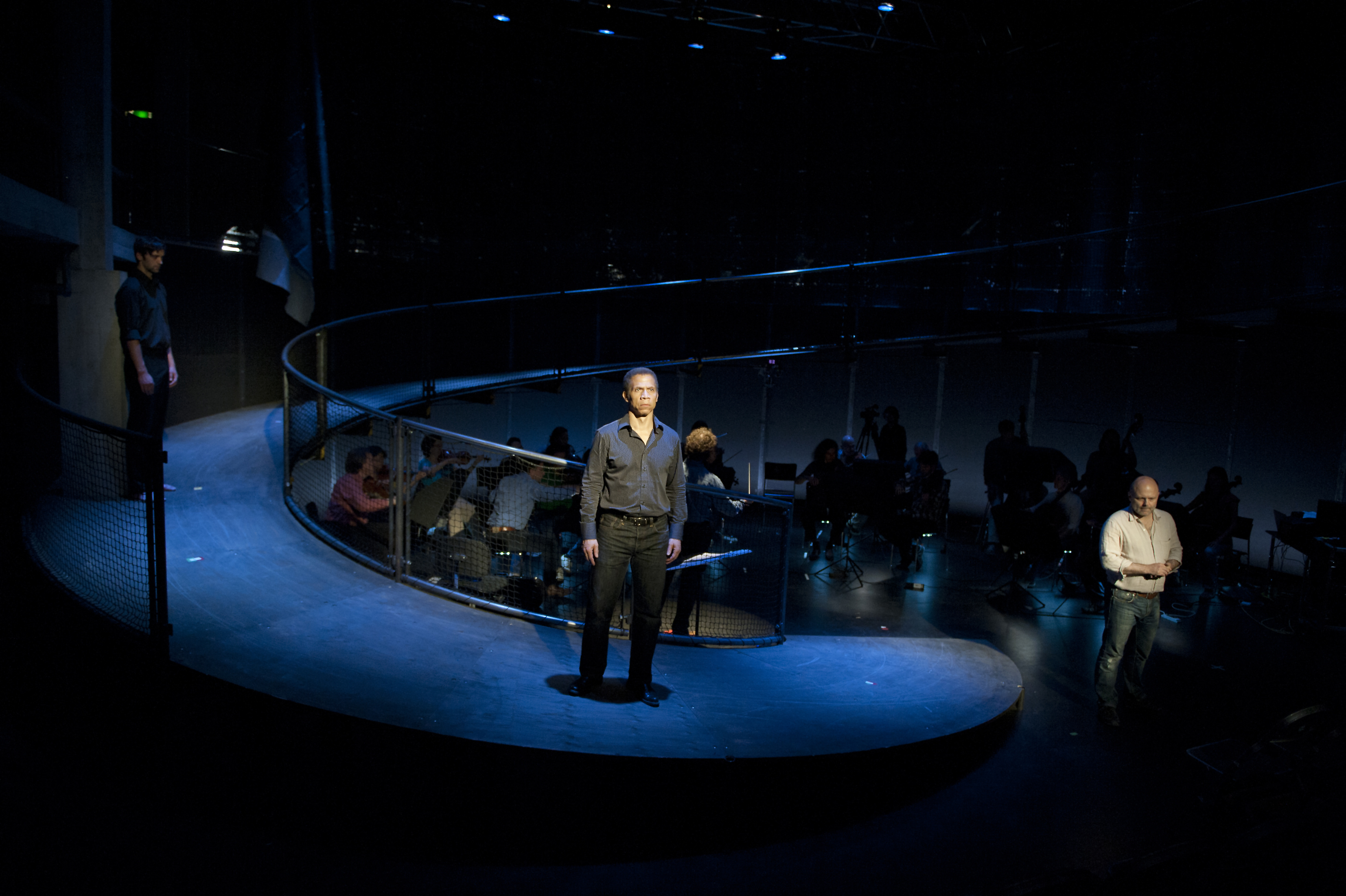 Répétition de l'opéra In the Penal Colony pour la première Suisse au Theater der Kunste de Zurich en mai 2011